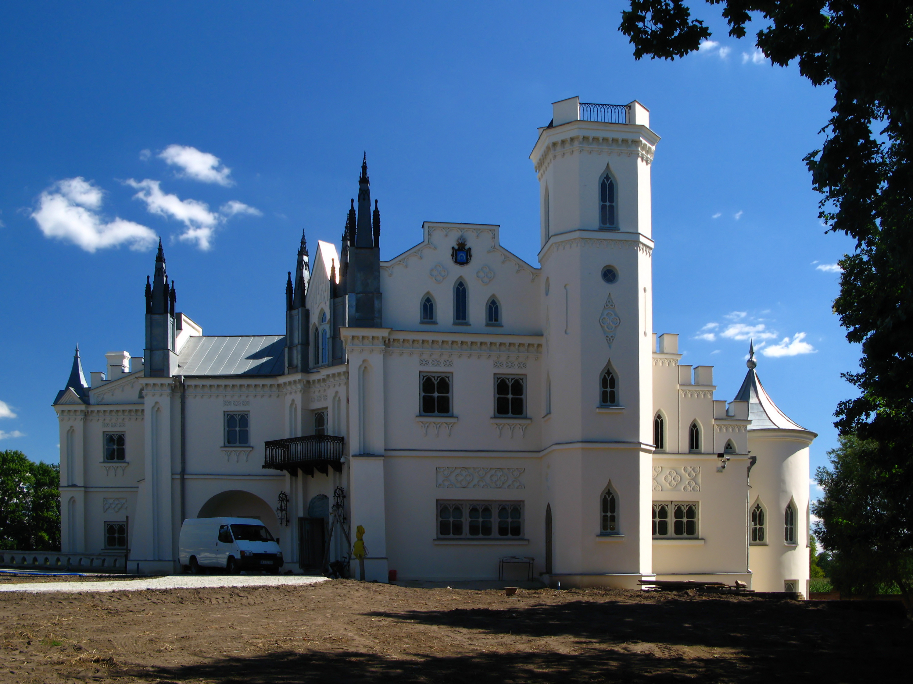 Patrykozy - zespół pałacowy, 1823-1843: pałac i park (zabytek nr rejestr. 56/2/56)